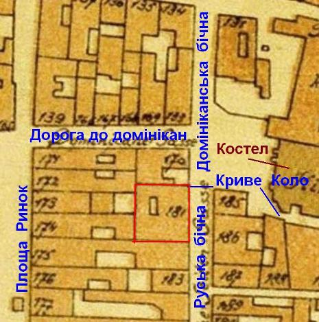 фрагмент плану Львова кінця 18 ст.